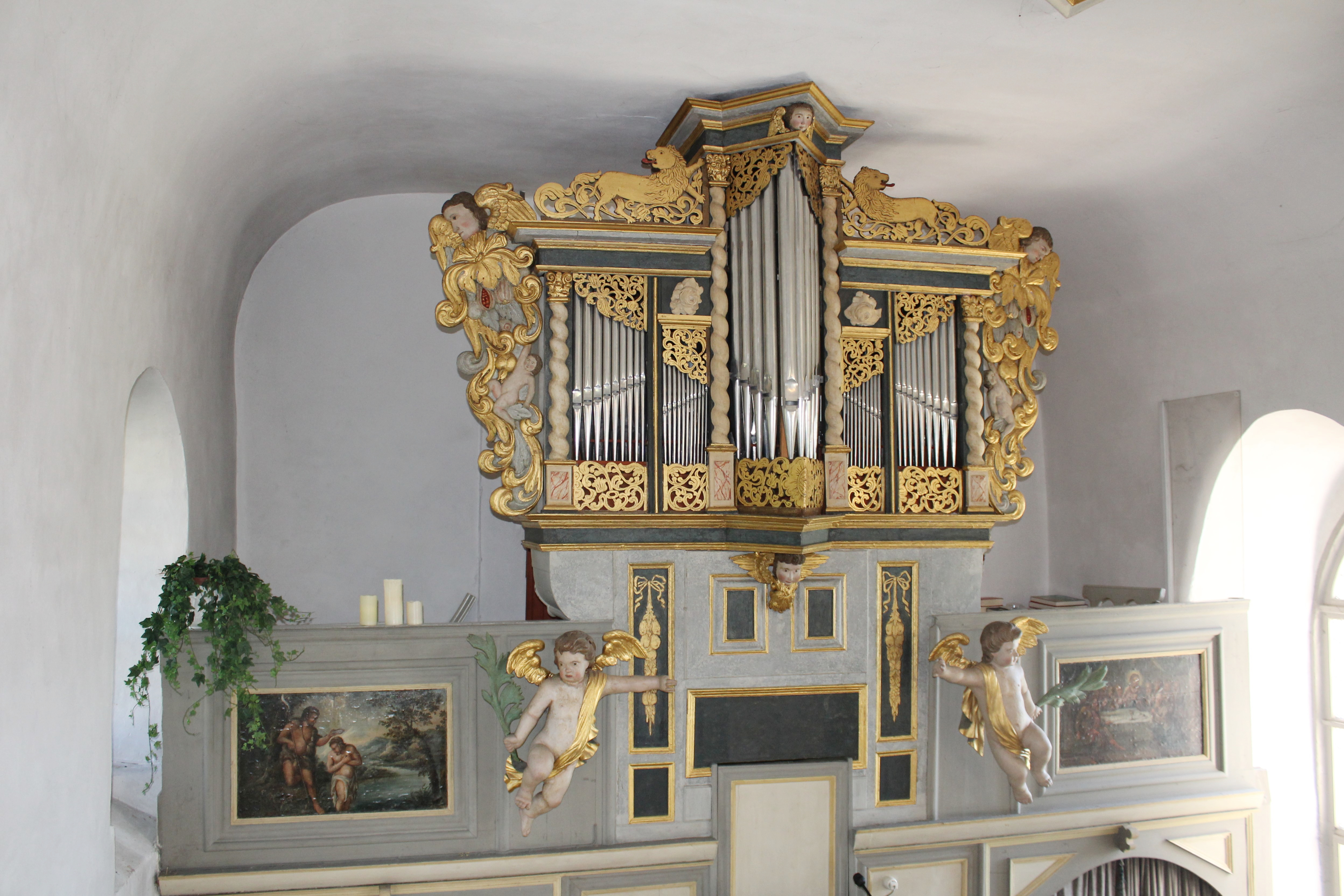 Ev. Kirche Oberbiel, Solms, Lahn-Dill-Kreis, Hessen, Deutschland